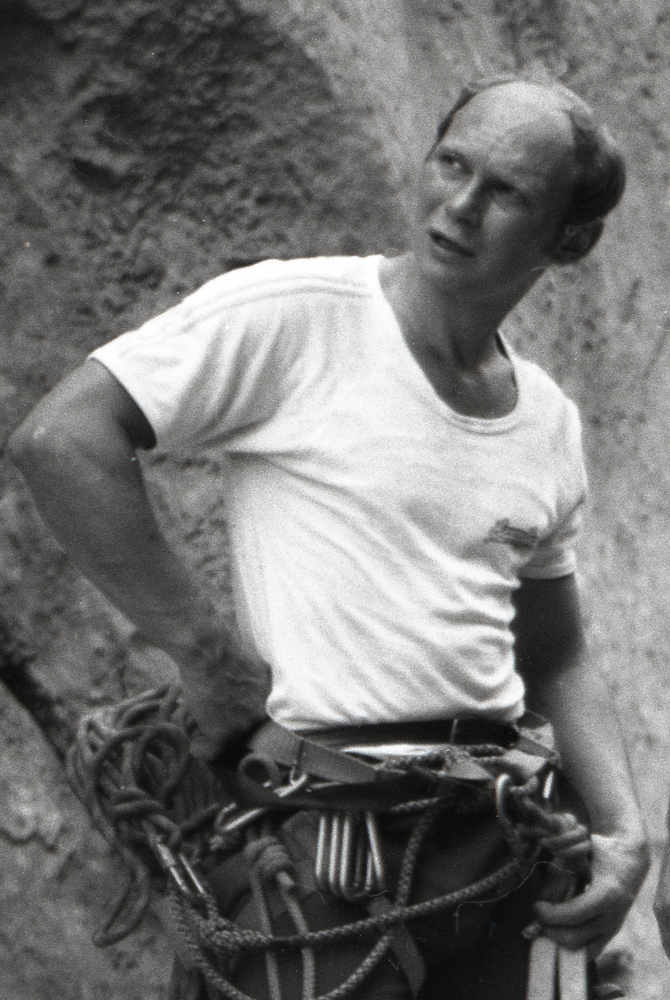 Aleksei Kovaltšuk, esimene Eesti mägironija, kes tõusis kaheksatuhandelise tippu (1996).